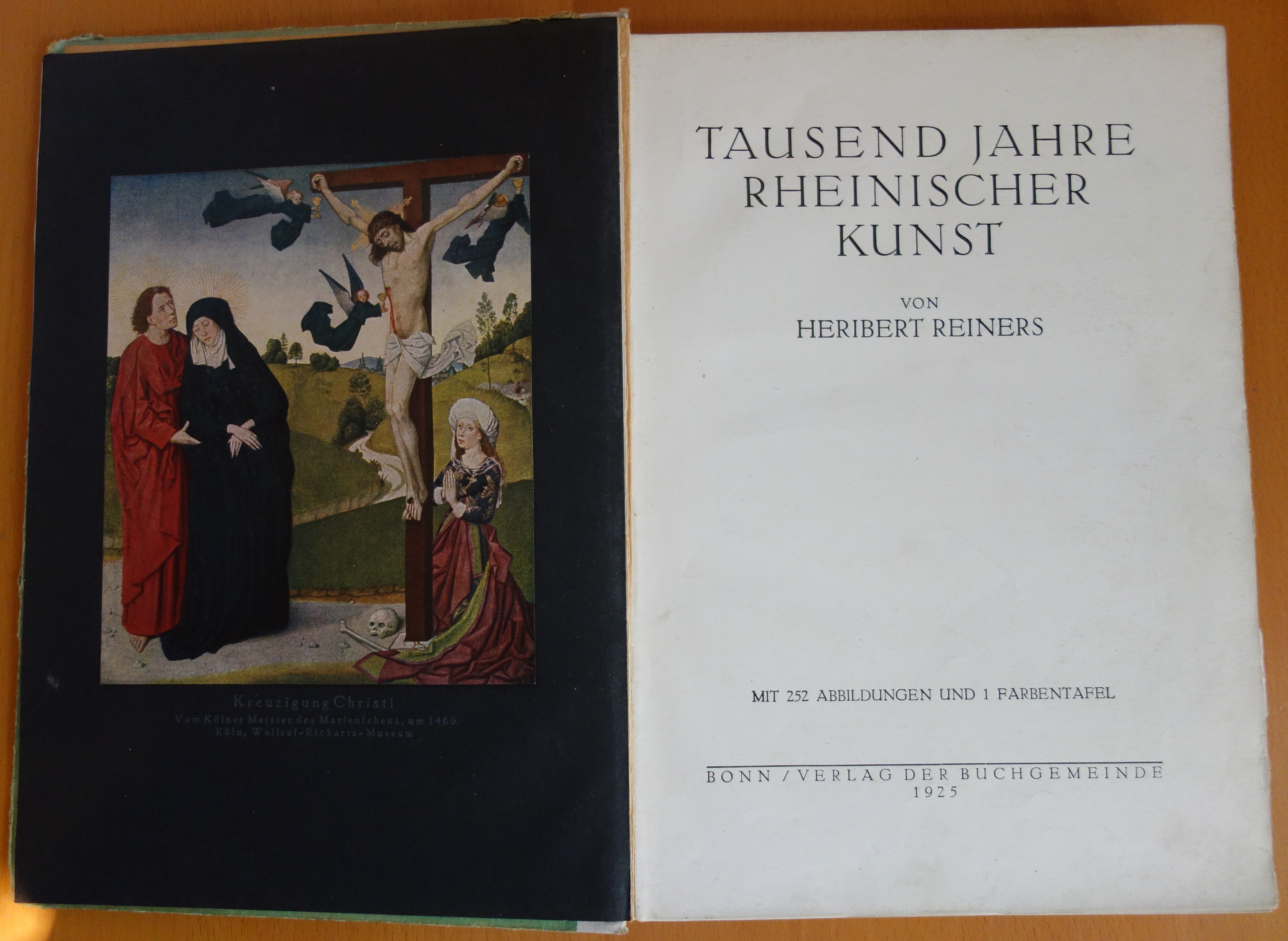 1000 Jahre Rheinischer Kunst von Heribert Reiners